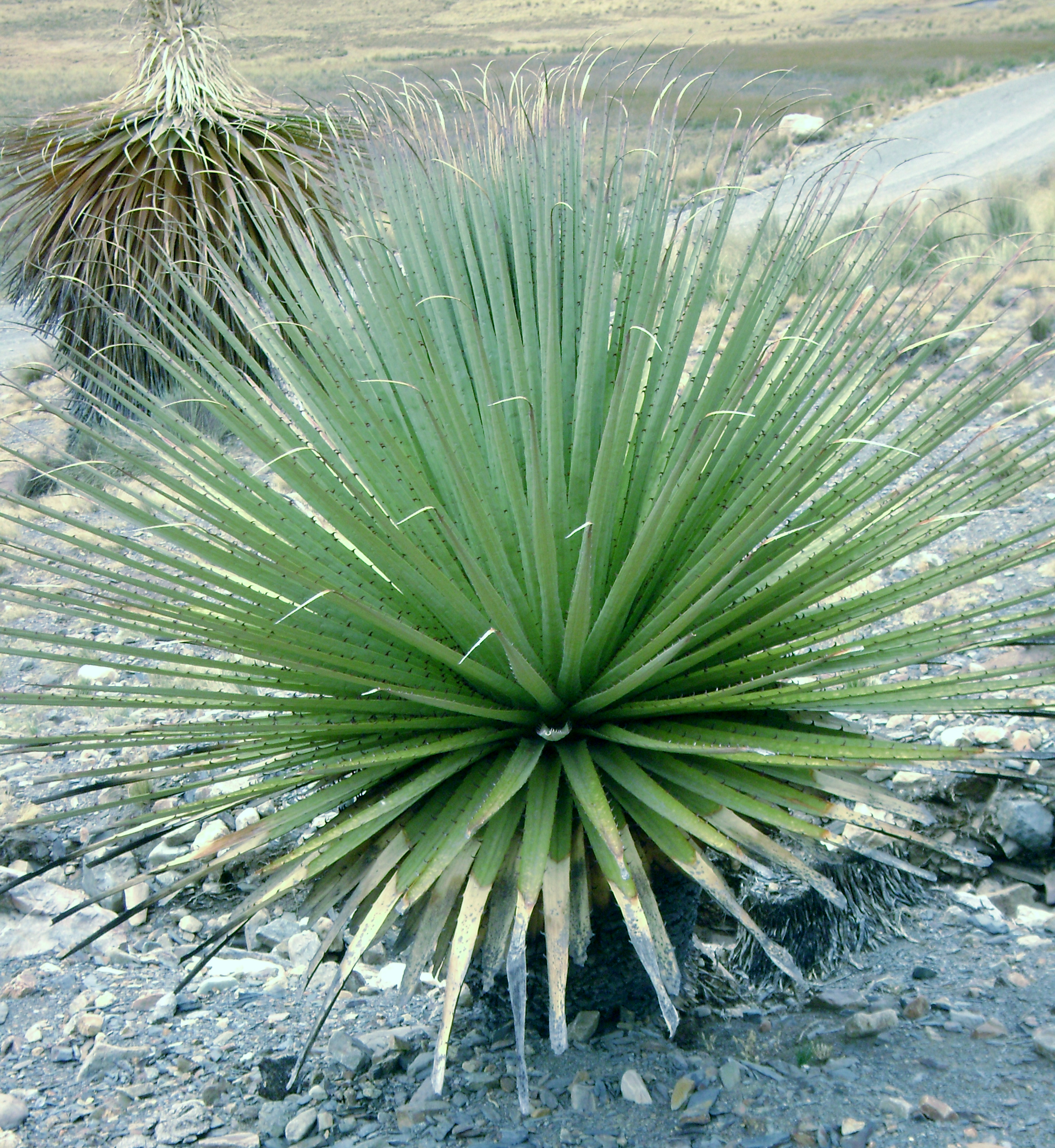 Imagen de una Puya Raimondi de tamaño pequeño tomada en el camino hacia el Nevado Pastoruri, ubicado en la Región Ancash, Perú.